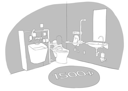 ภาพแสดงห้องน้ำที่ต้องมีพื้นที่โล่งเป็นวงกลมเส้นผ่าศูนย์กลาง 1.50 เมตร เพื่อการหมุนของรถเก้าอี้ล้อเลื่อนคนพิการ รถเก้าอี้ล้อเลื่อนเด็ก ผู้สูงอายุที่ใช้อุปกรณ์พยุงตัว